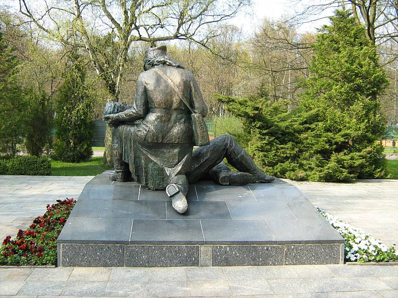 Pomnik Sanitariuszki w Kołobrzegu. Widok od strony południowej (tył).